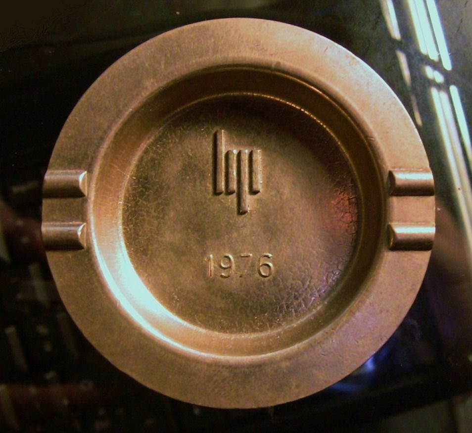 Cendrier de l'usine LIP de Besançon